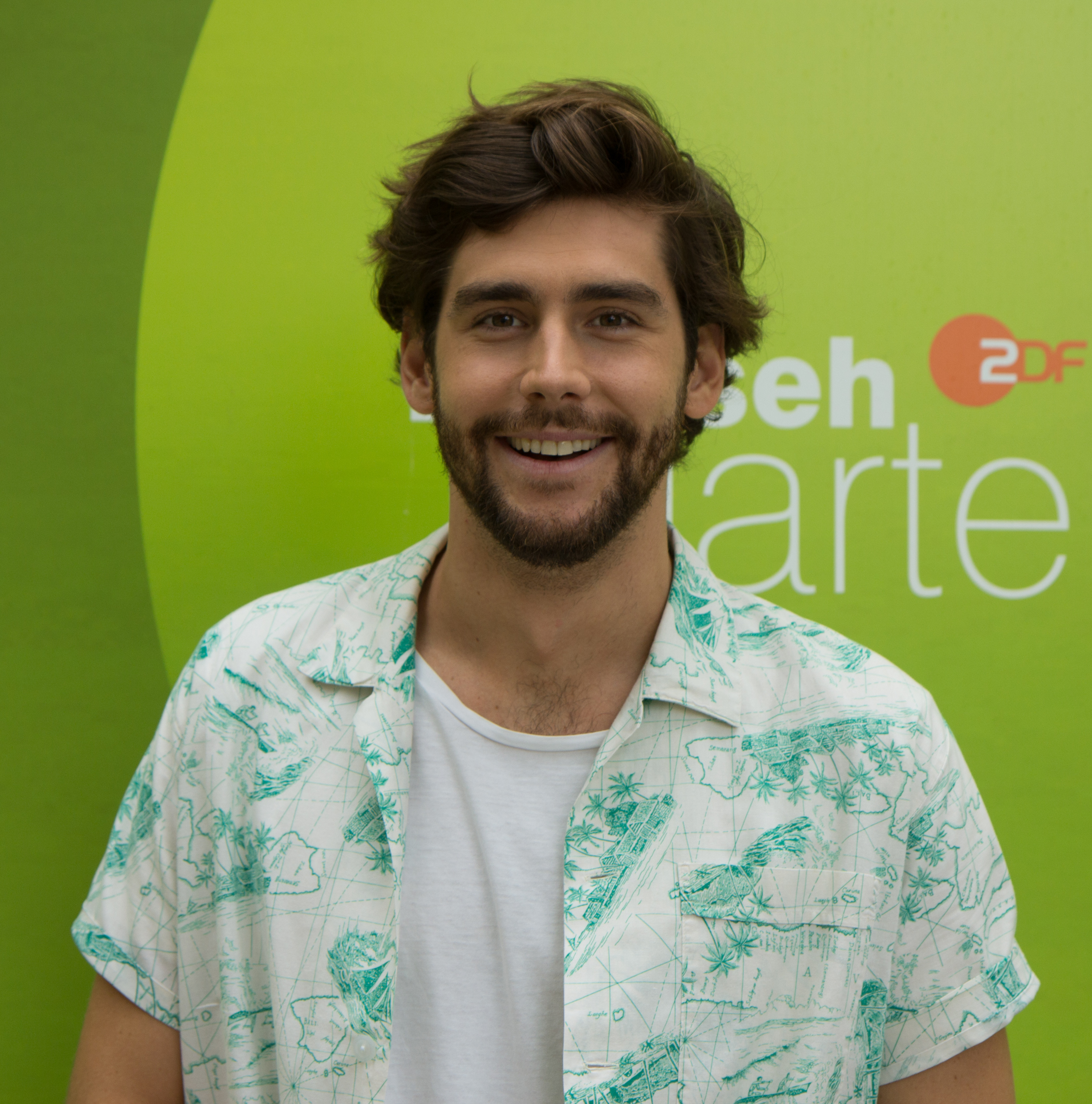 Alvaro Soler als Gast im ZDF-Fernsehgarten am 2. September 2018 in Mainz.